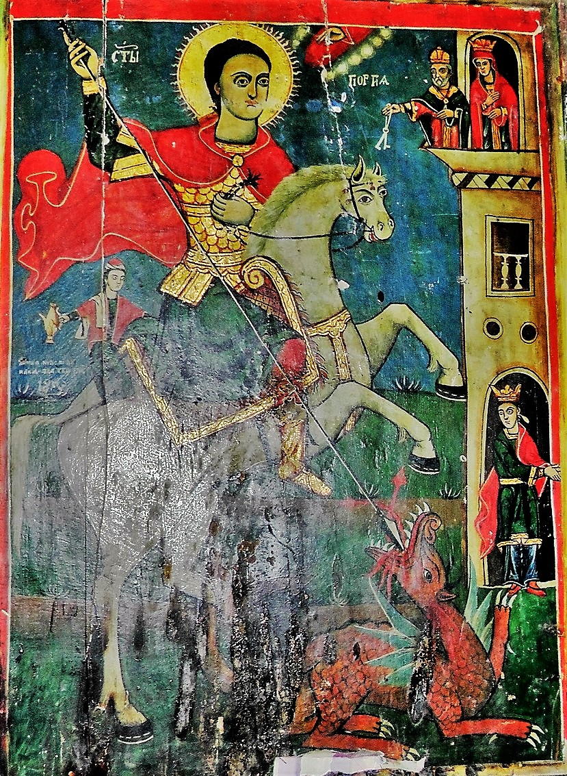 икона во црквата „Св. Ѓорѓи“ во прилепско Слепче